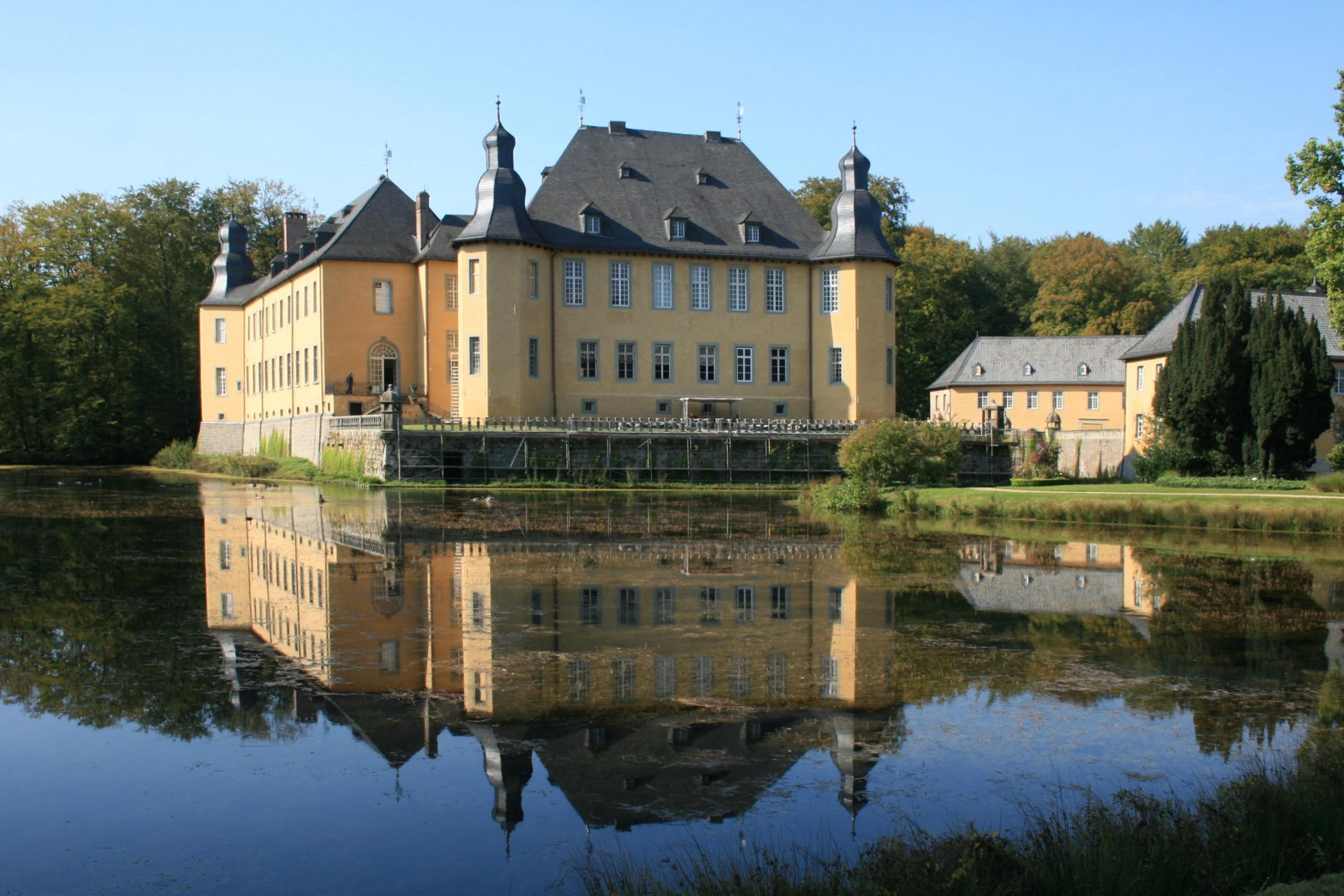 Es handelt sich um das Schloss Dyck in der Gemeinde Jüchen in Rheinland